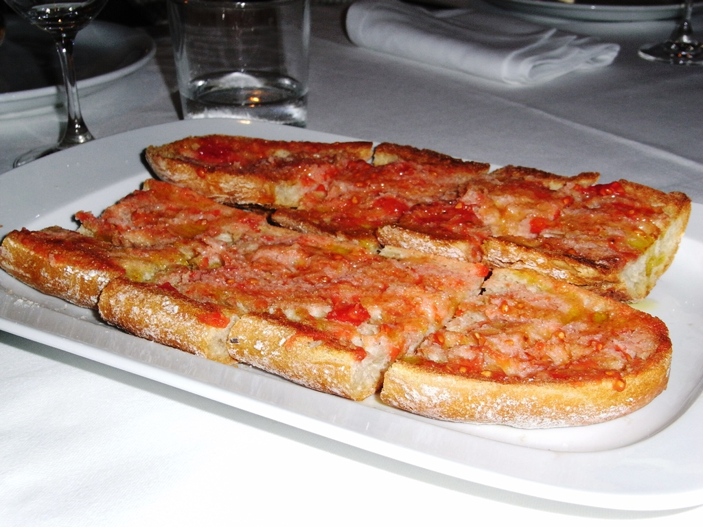 Pan tumaca